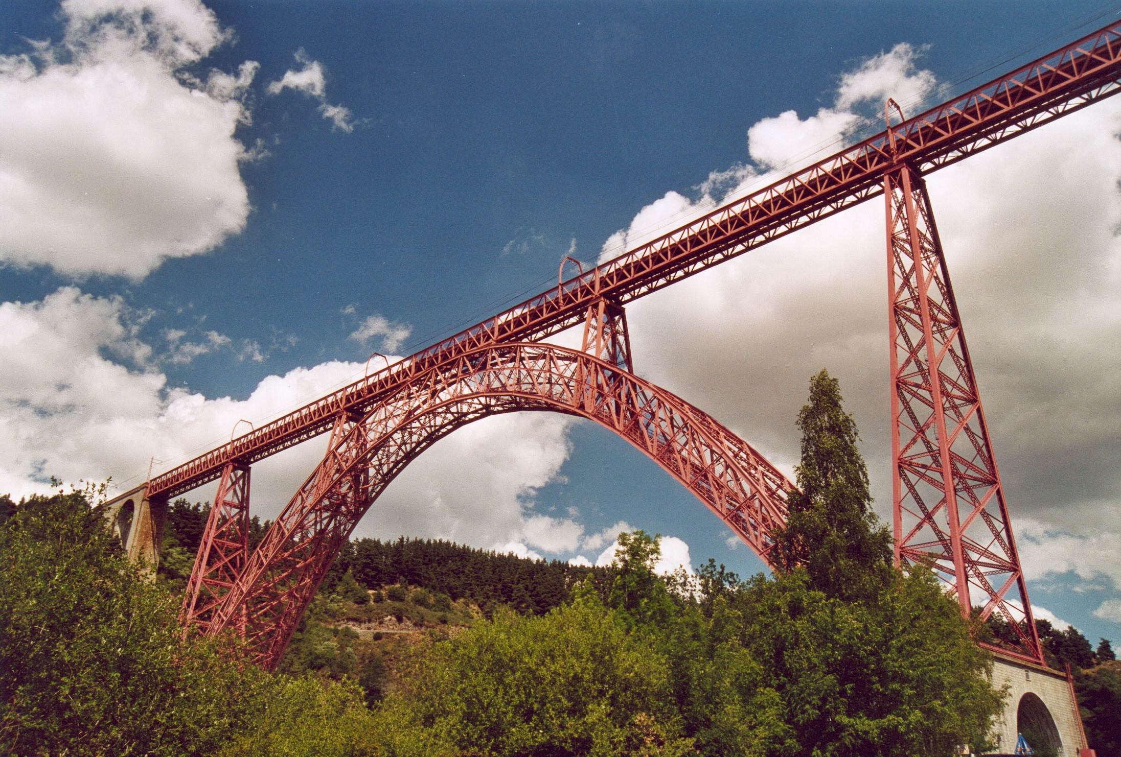 France Cantal Viaduc de Garabit Photographie prise par GIRAUD Patrick